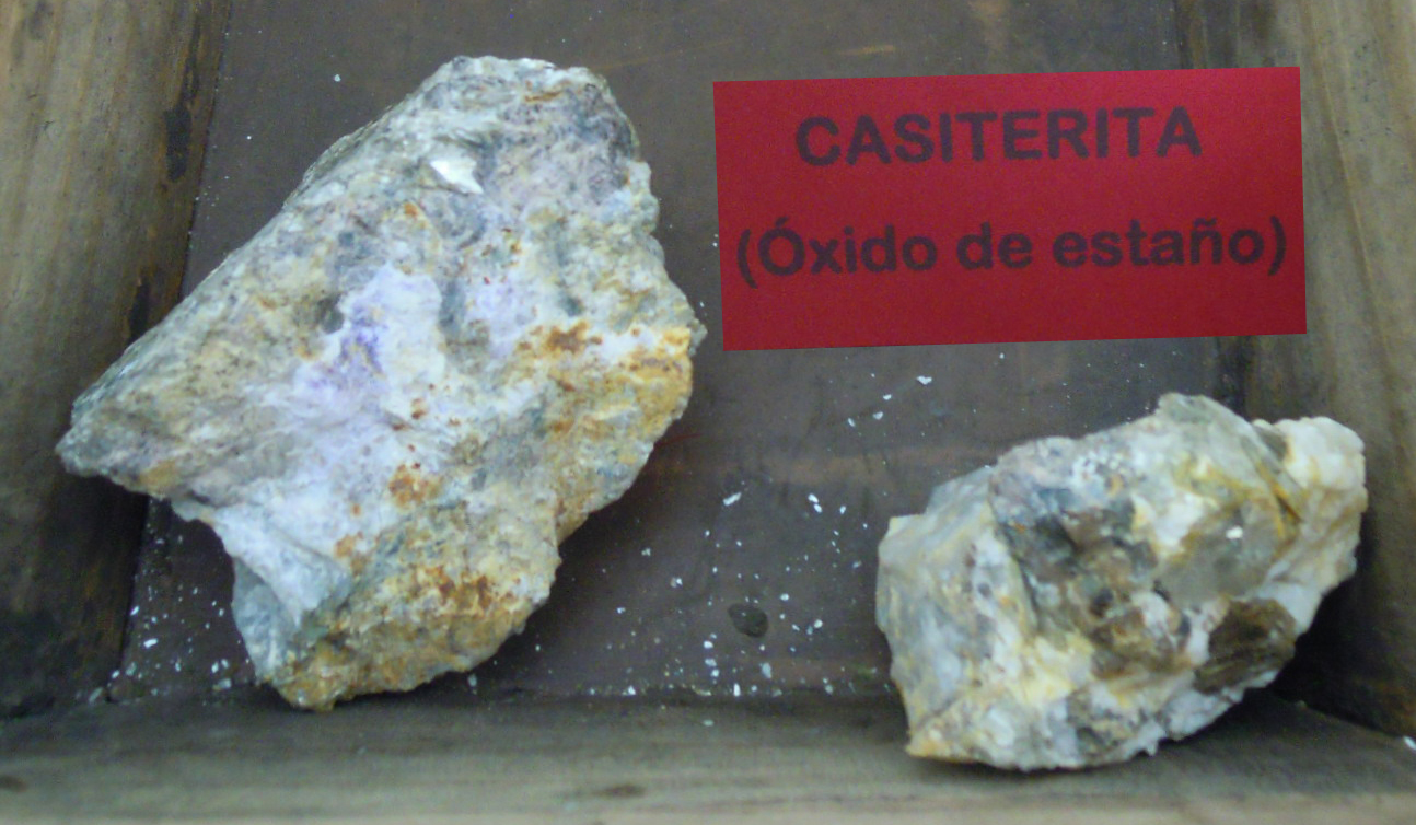 Rochas de casiterita (SnO2) achadas nas minas de San Fins (Lousame).